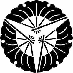 Matsudaira (Takiwaki) family crest